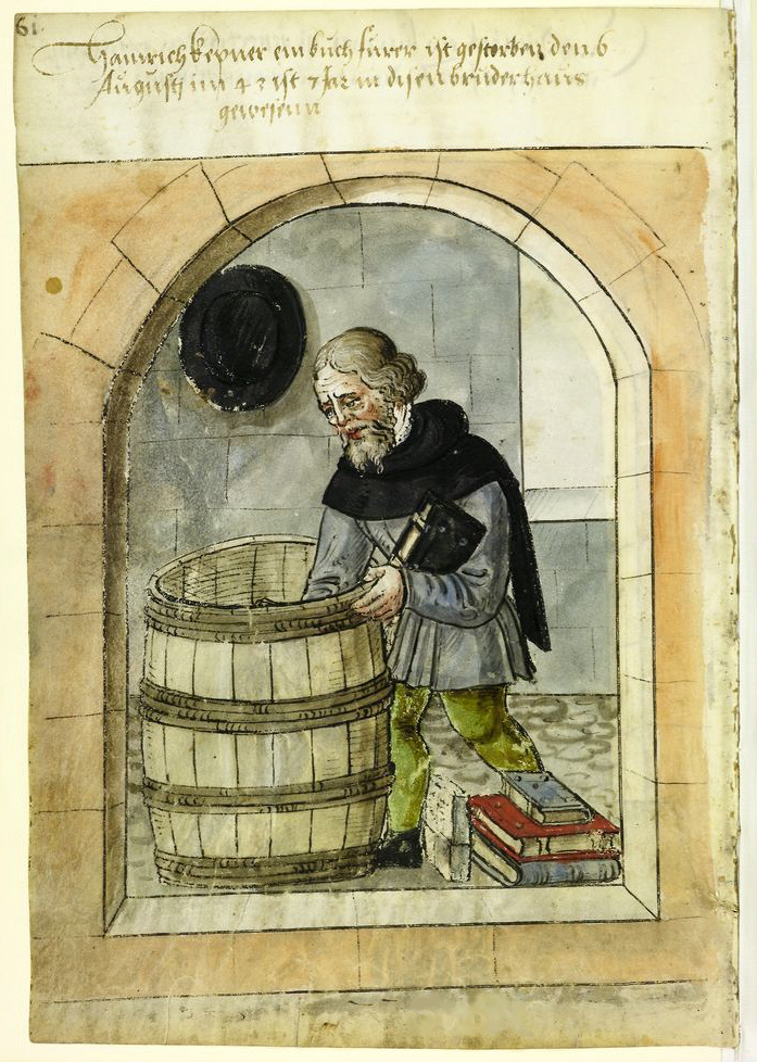 Transkription und weitere Informationen Hainrich (Heinrich) Kepner (Kepner; Keppner), buch furer (Buchführer)